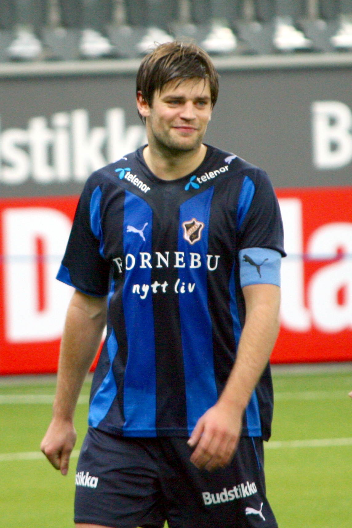 Morten Morisbak Skjønsberg.